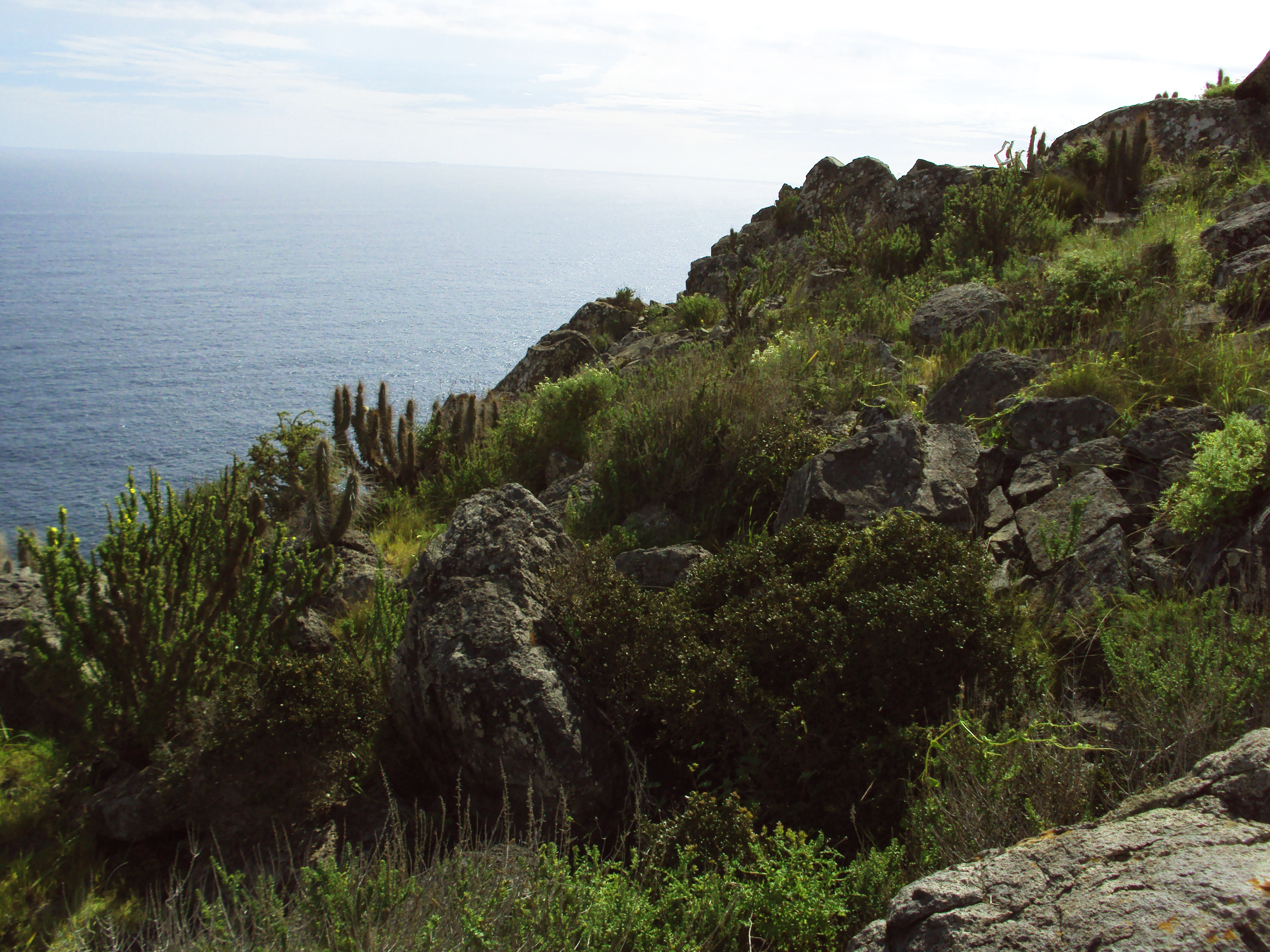 M. coquimbesis en la zona costera de Coquimbo